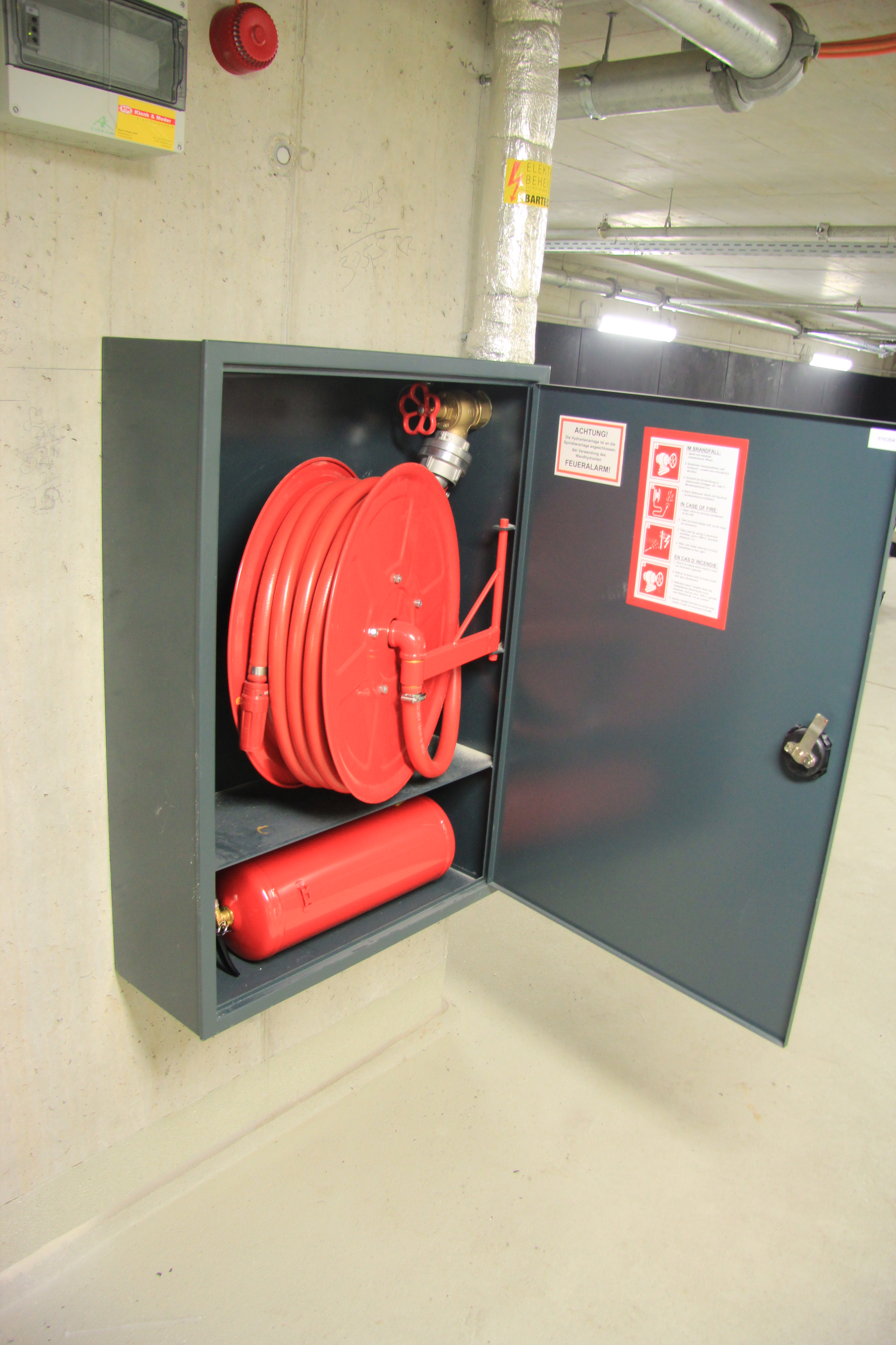 Wandhydrant mit festem Schlauch am Wiener Hauptbahnhof